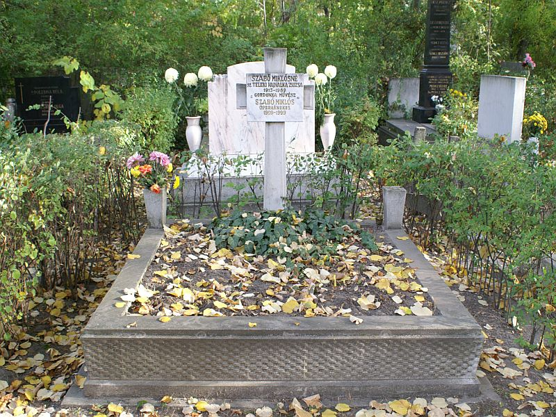 Szabó Miklós (Székesfehérvár, 1909. november 27. - Budapest, 1999. május 22) operaénekes sírja Budapesten. Megyeri temető: 20/0/1/94-95.